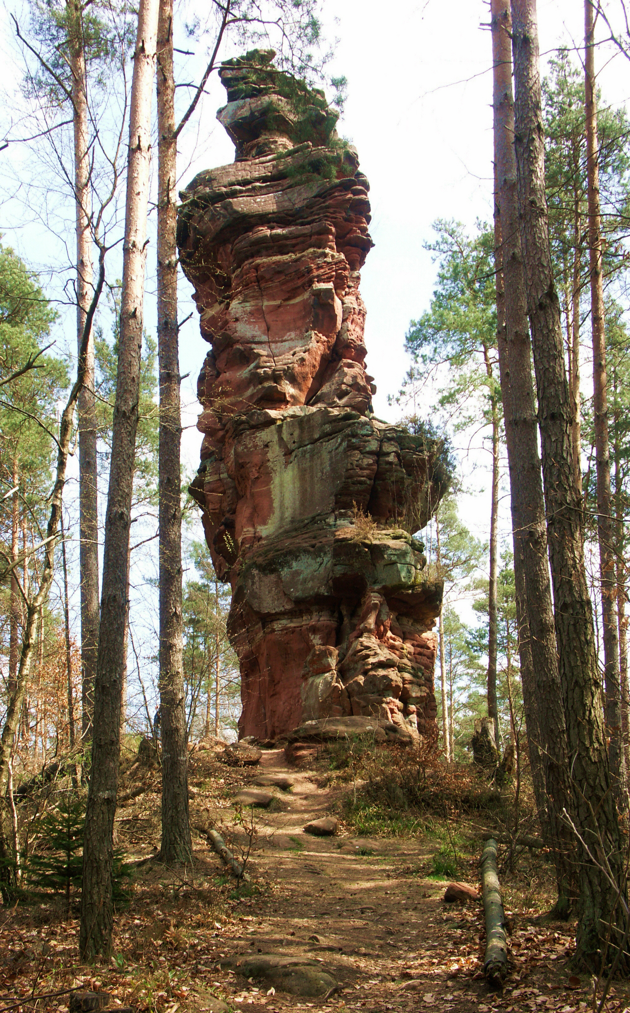 Napoleonsfels über dem Reinigshof, Rheinland-Pfalz, Deutschland